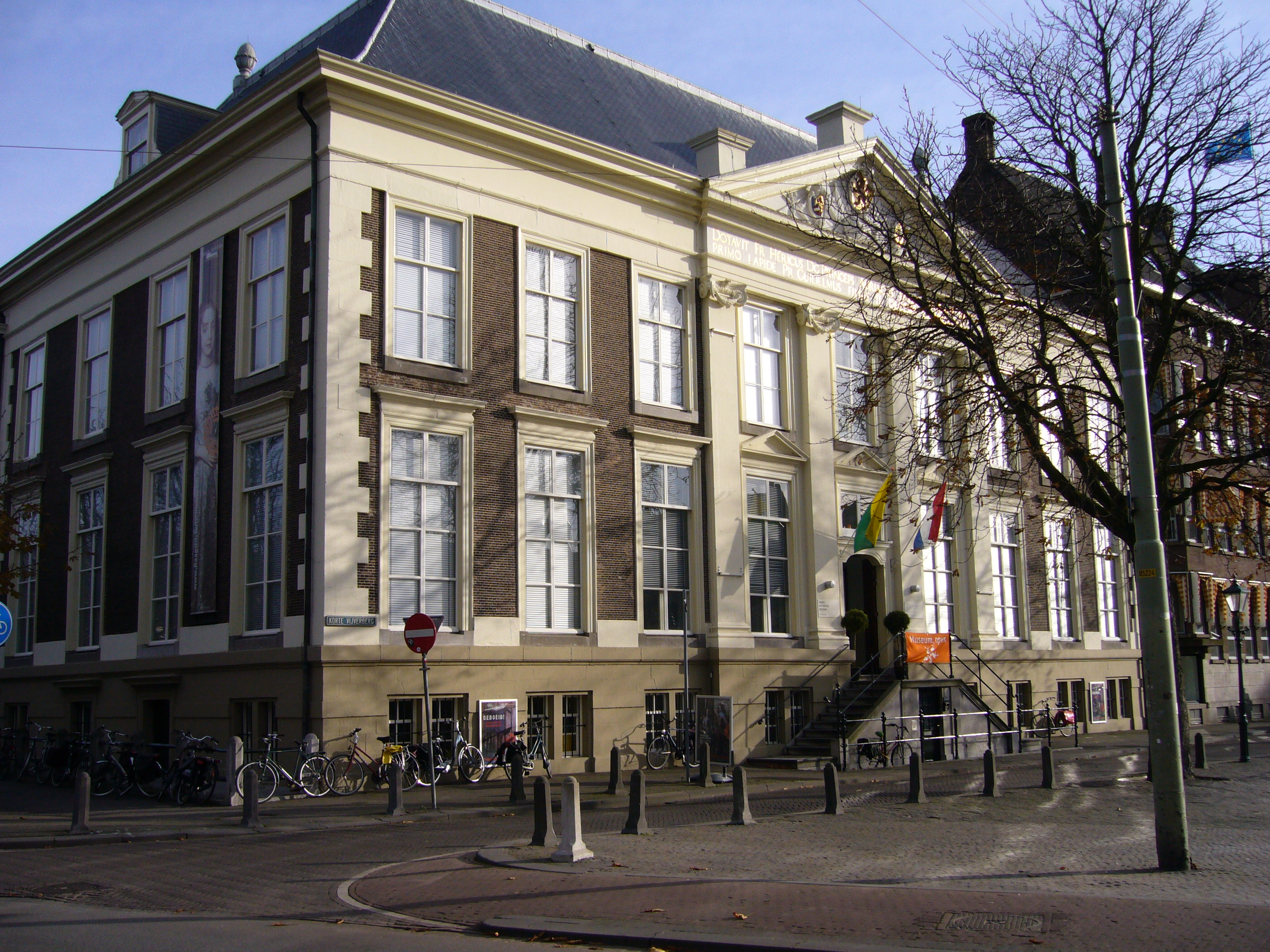 Haags Historish Museum aan de Kore Vijverberg